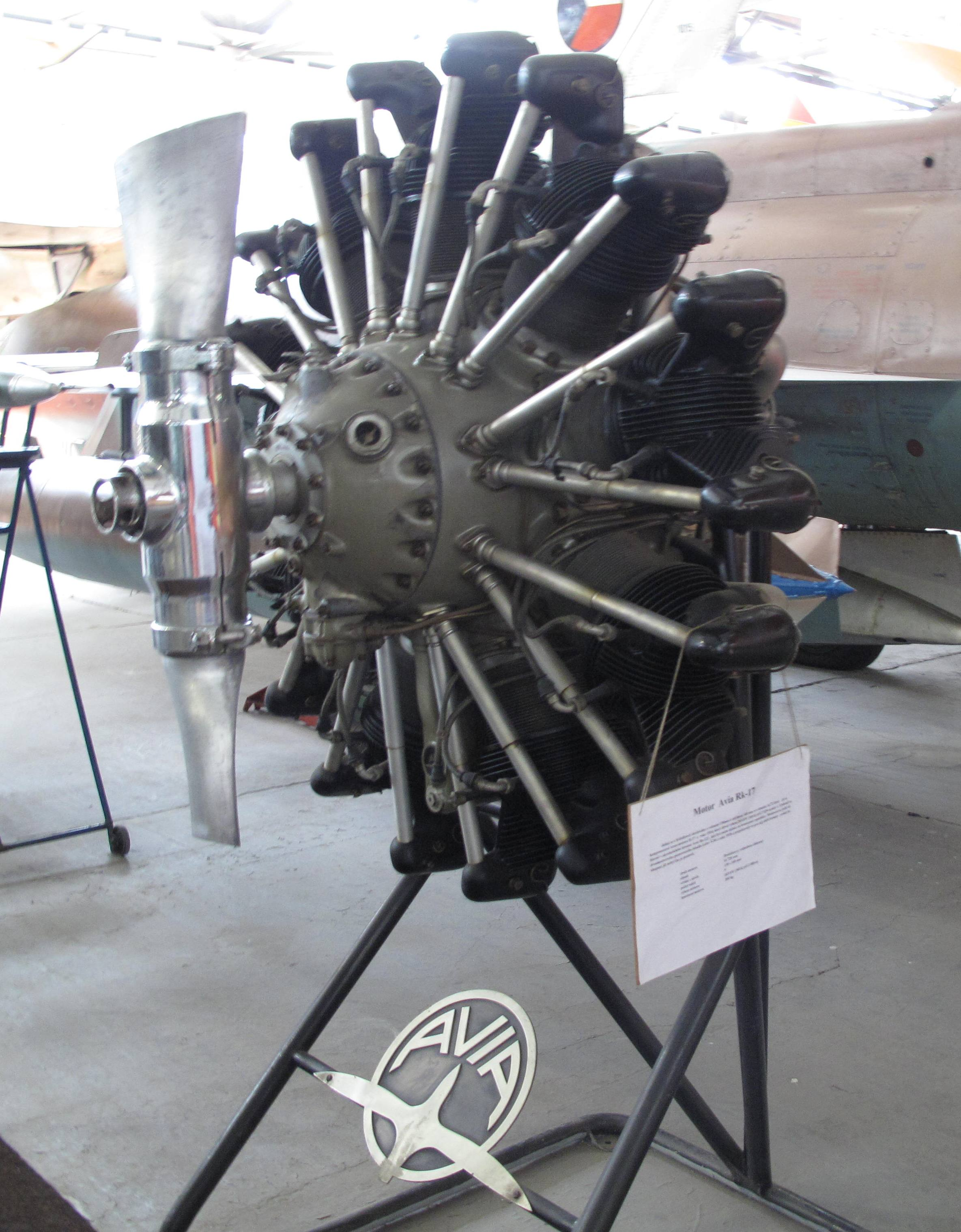 Avia Rk-17; Letecké muzeum Kbely